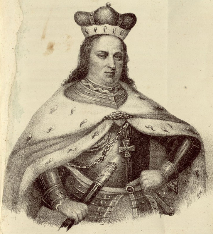 Беларуская (тарашкевіца): Партрэт Вітаўта Вялікага (Vitaŭt Vialiki)